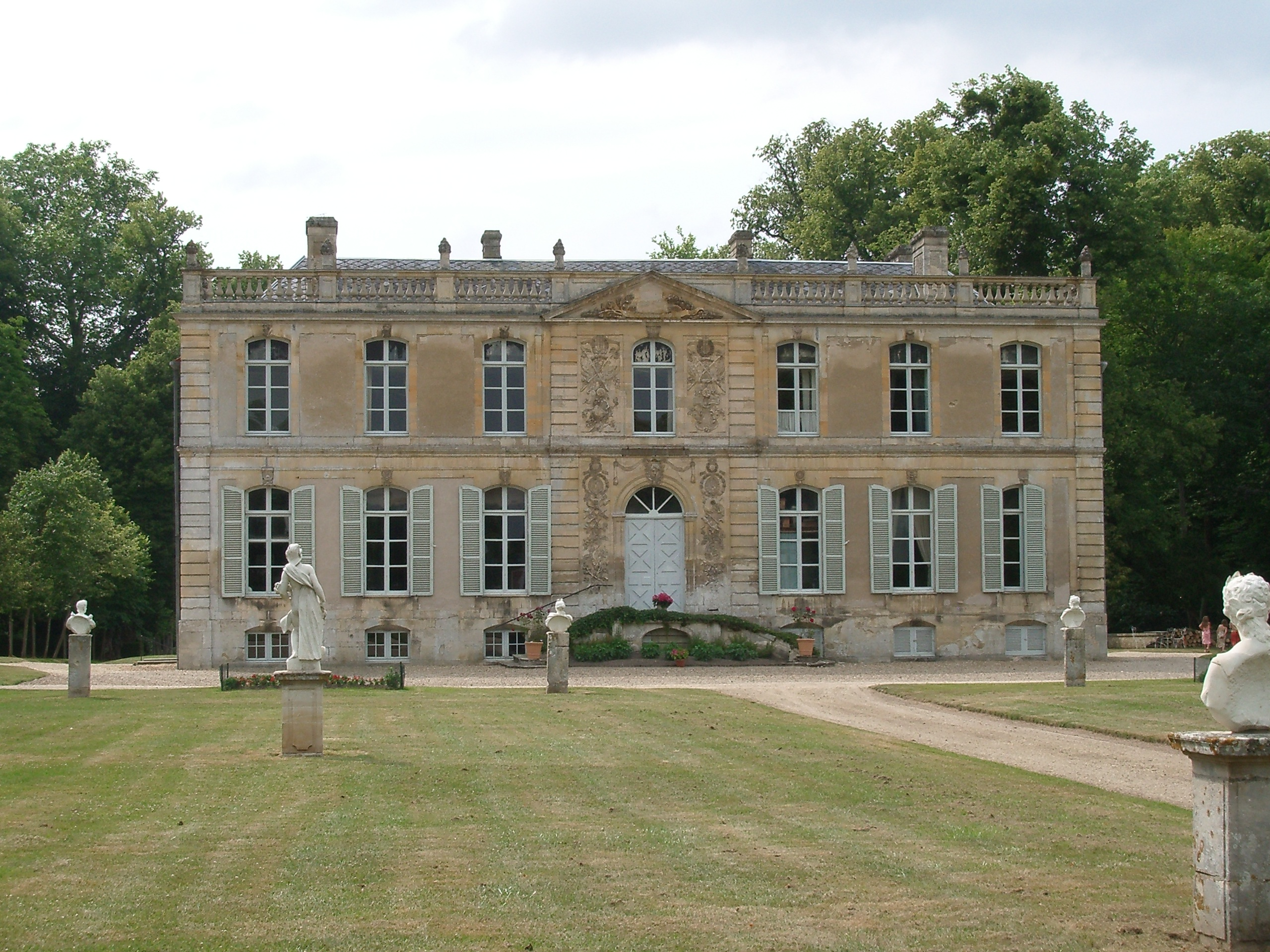 Chateau de Canon Photo de Koreus